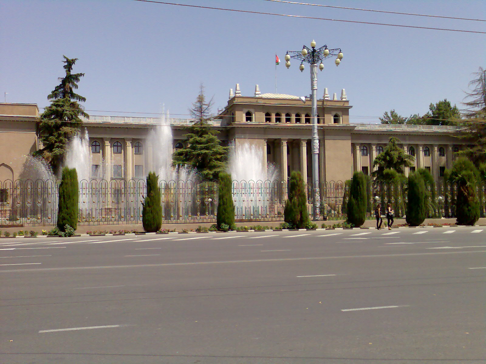 Тоҷикӣ: Ин расм 30 июли 2008 бо камераи телефони Нокиа 6233 гирифта шудааст.